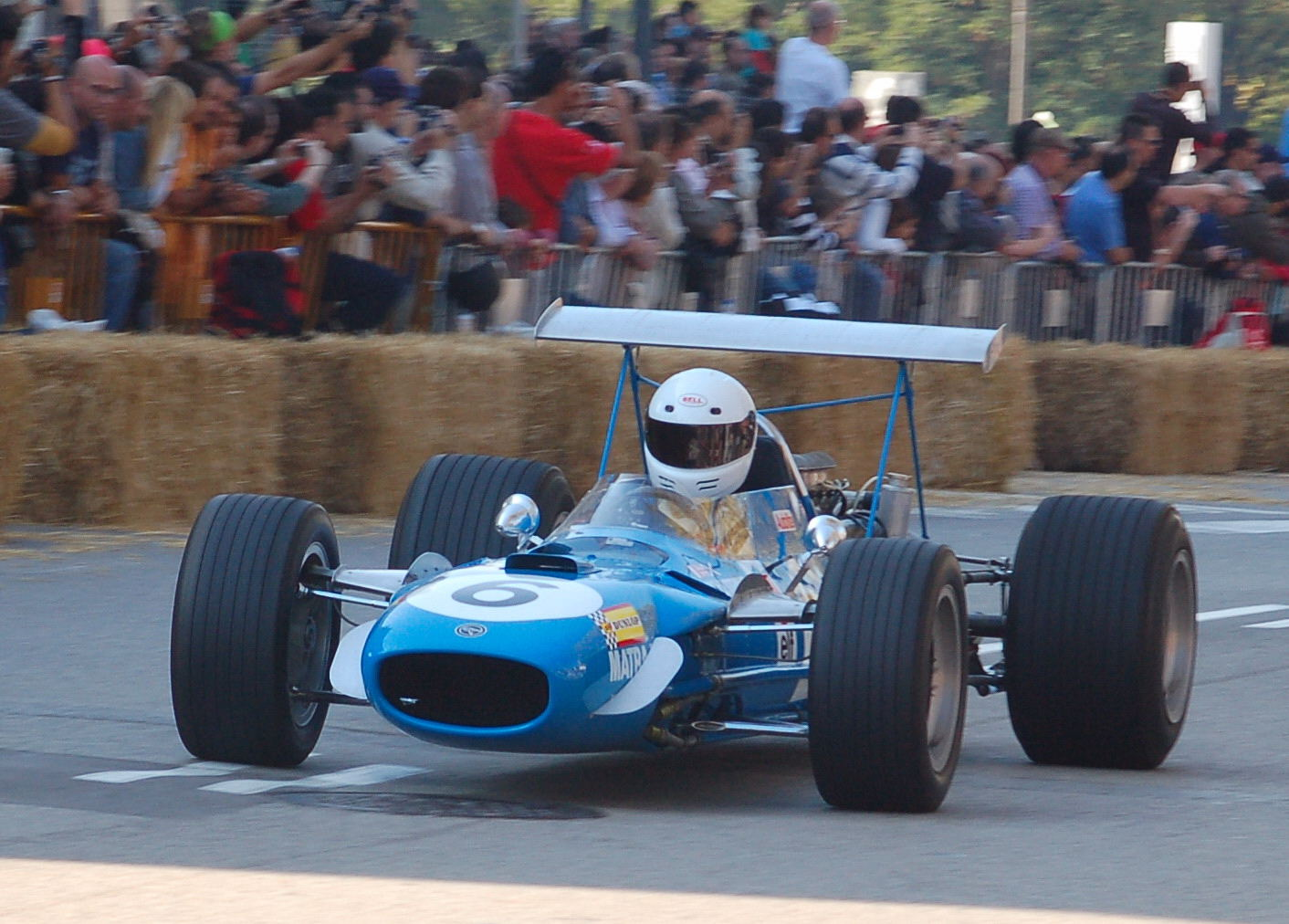 Matra MS10 - Jackie Stewart